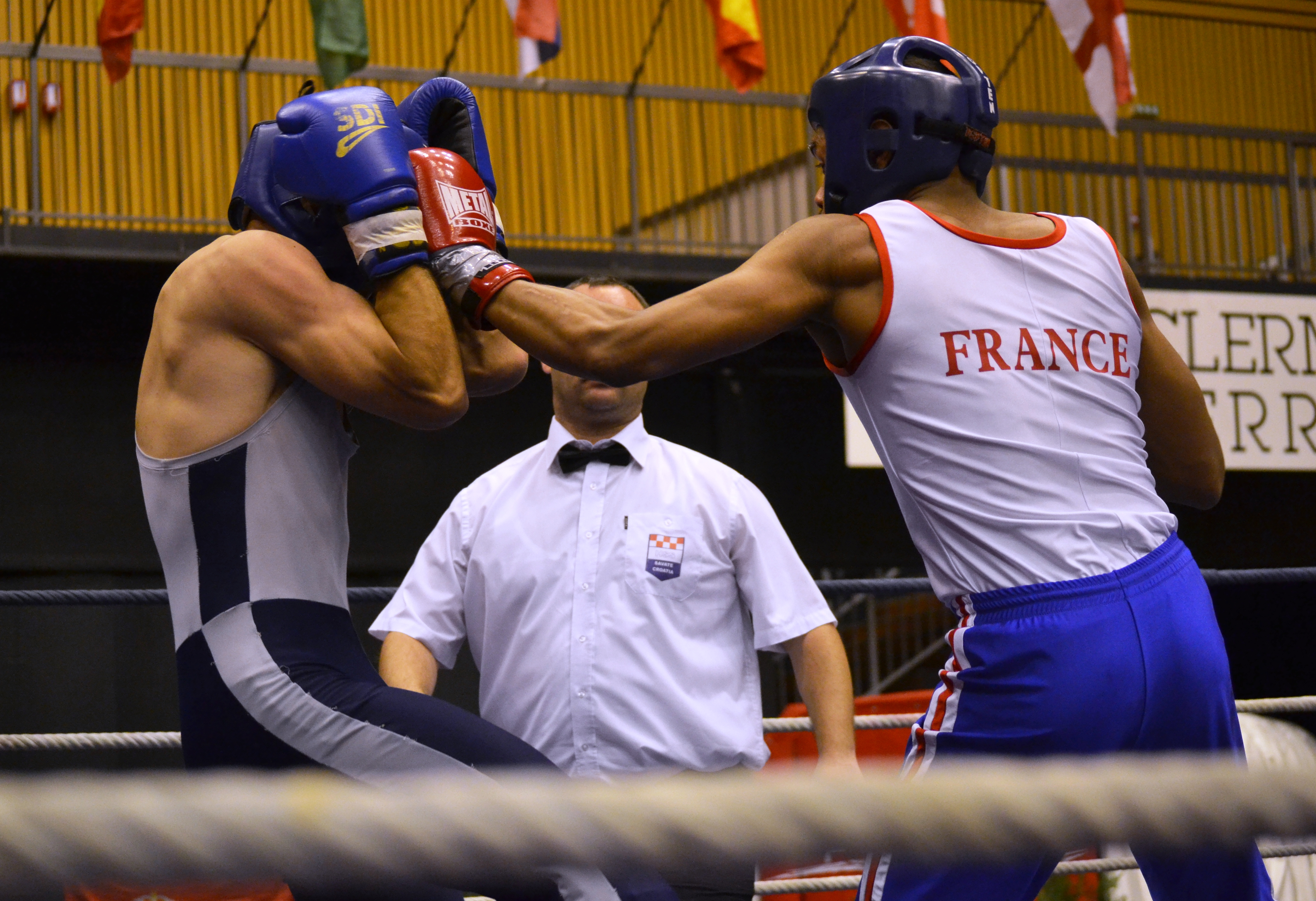 Championnat Monde (qualif) 2013 - M